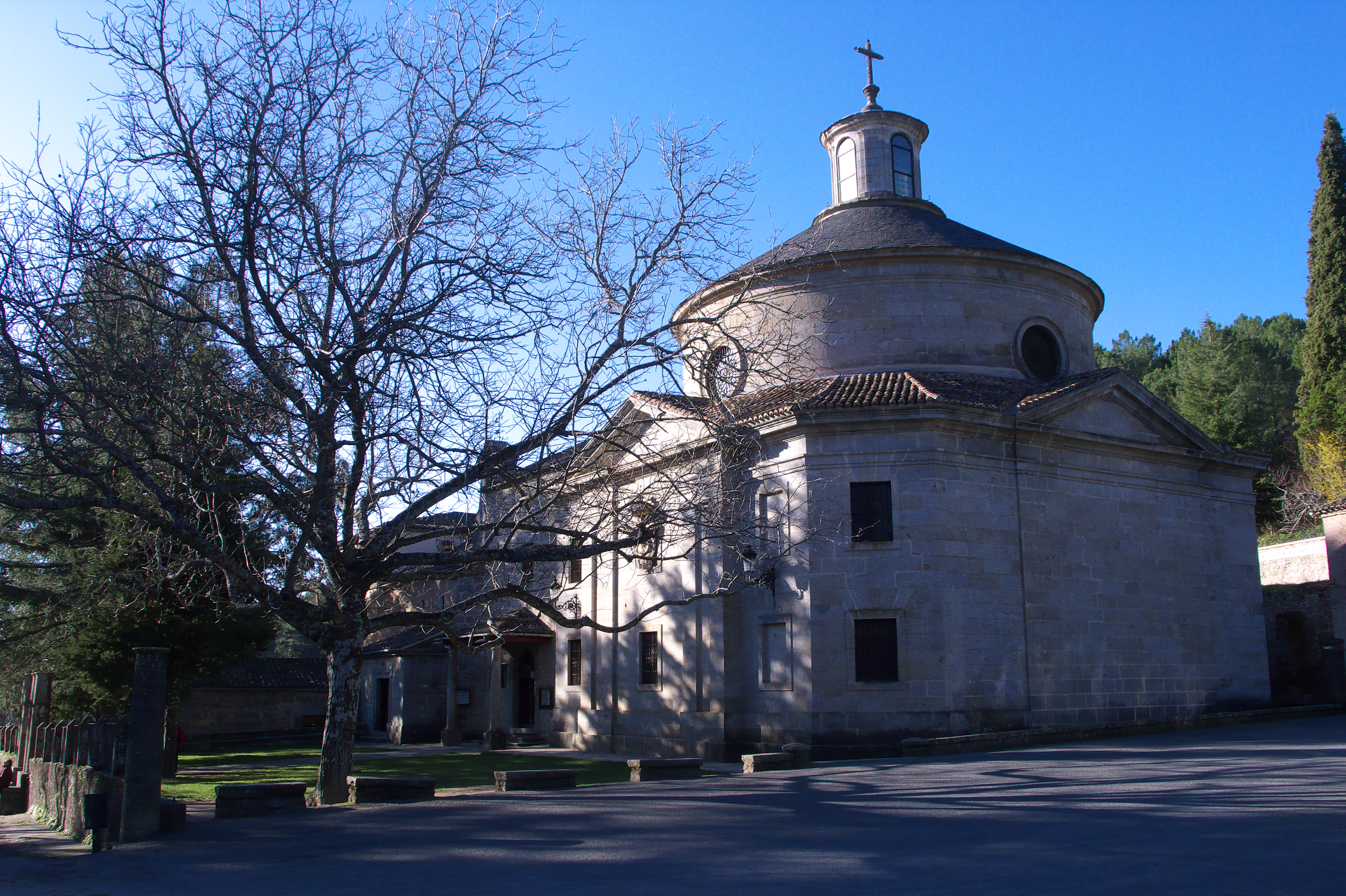 Santuario de San Pedro de Alcántara, Arenas de San Pedro, Ávila, España